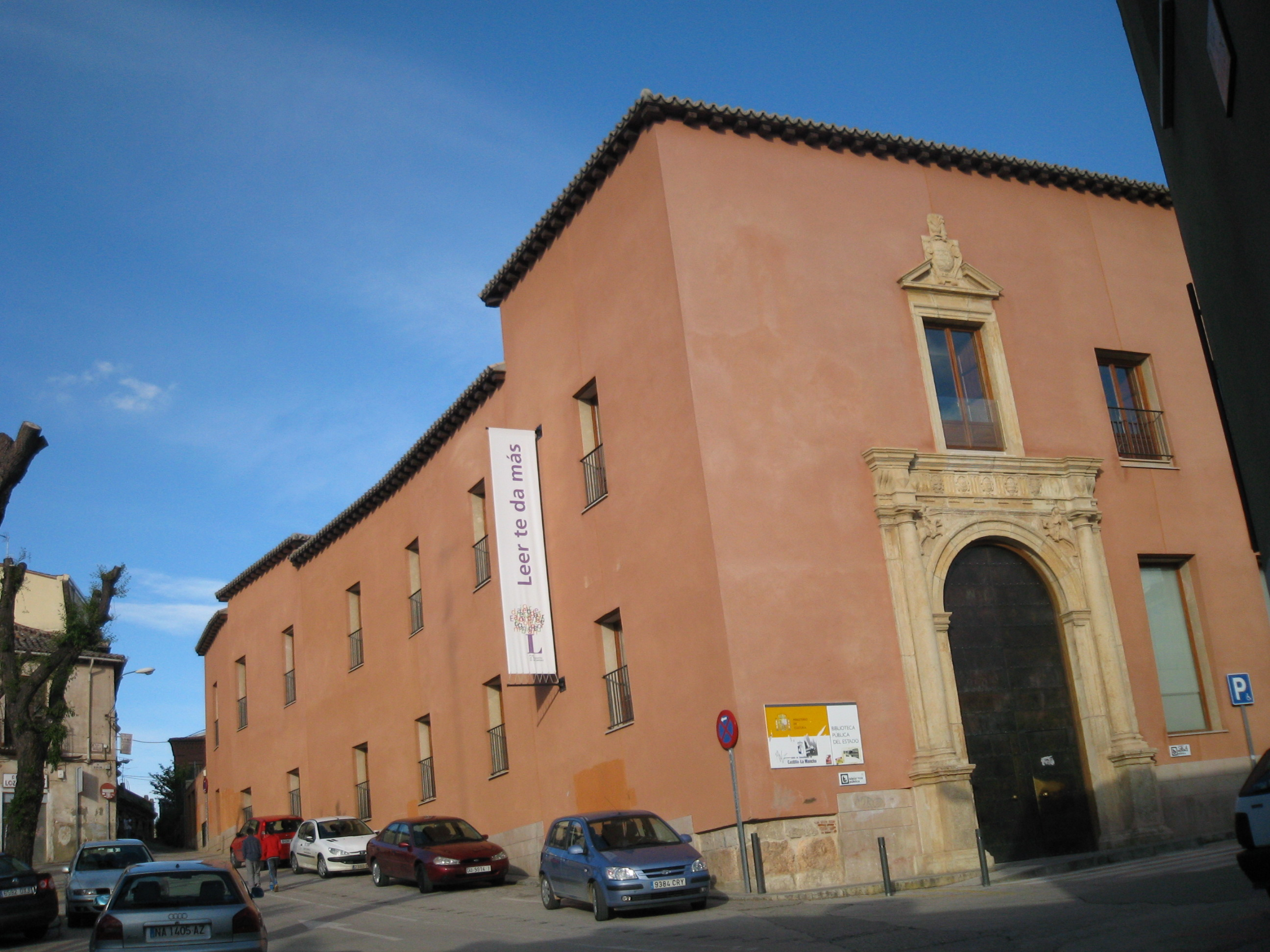 Palacio de Dávalos in Guadalajara, Spain